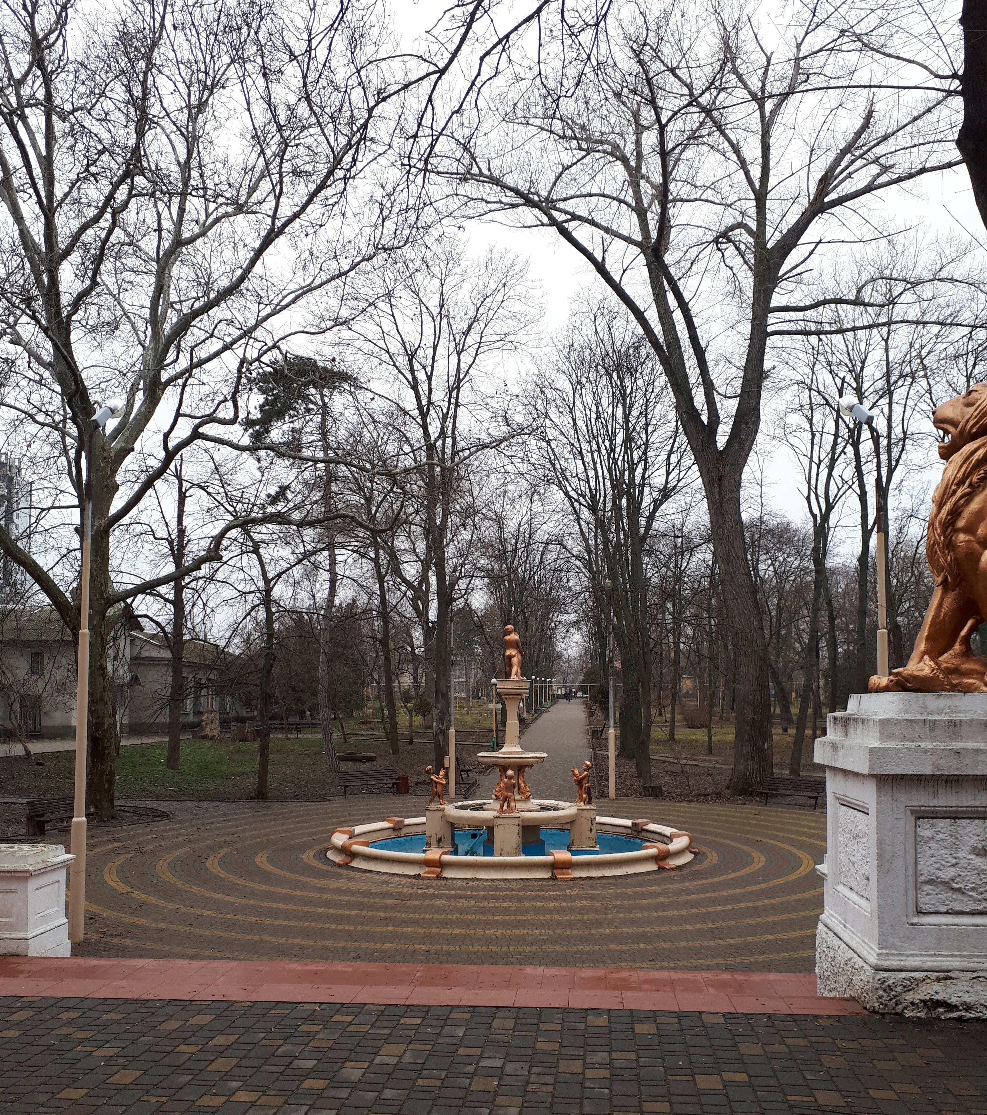 Парк санатория. Признан памятником паркового искусства